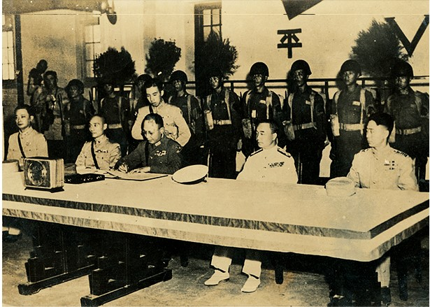 1945年9月9日8時51分，中國戰區代表接受日軍投降儀式在南京舉行。中國陸軍總司令何應欽,第三戰區司令長官顧祝同,陸軍參謀長蕭毅肅,海軍總司令陳紹寬,空軍第一路司令張廷孟。